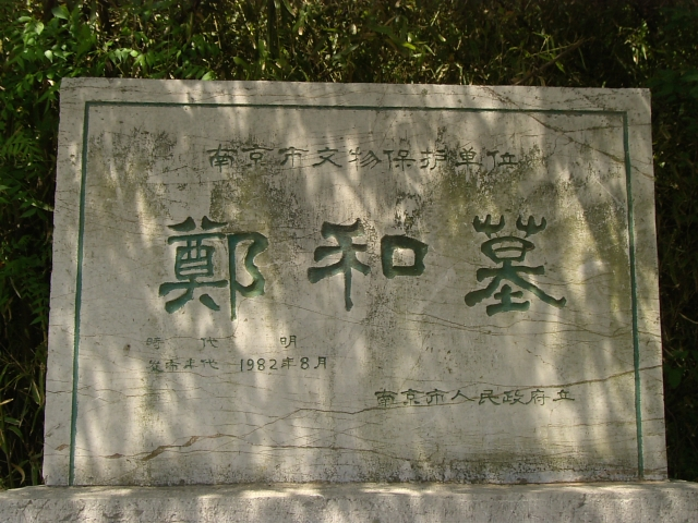 鄭和墓 南京市文物保護単位石碑 2004年4月24日撮影 撮影者：権作 参照：